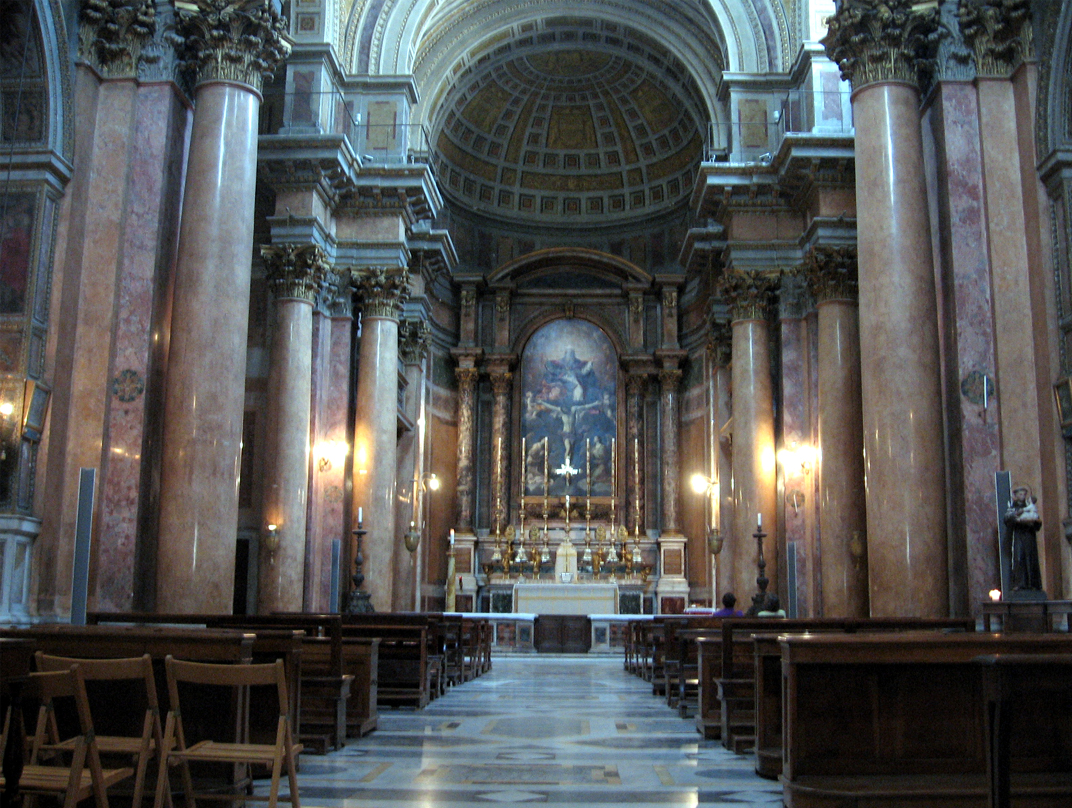 Church of Santissima Trinità sei Pellegrini, Rome - Interior